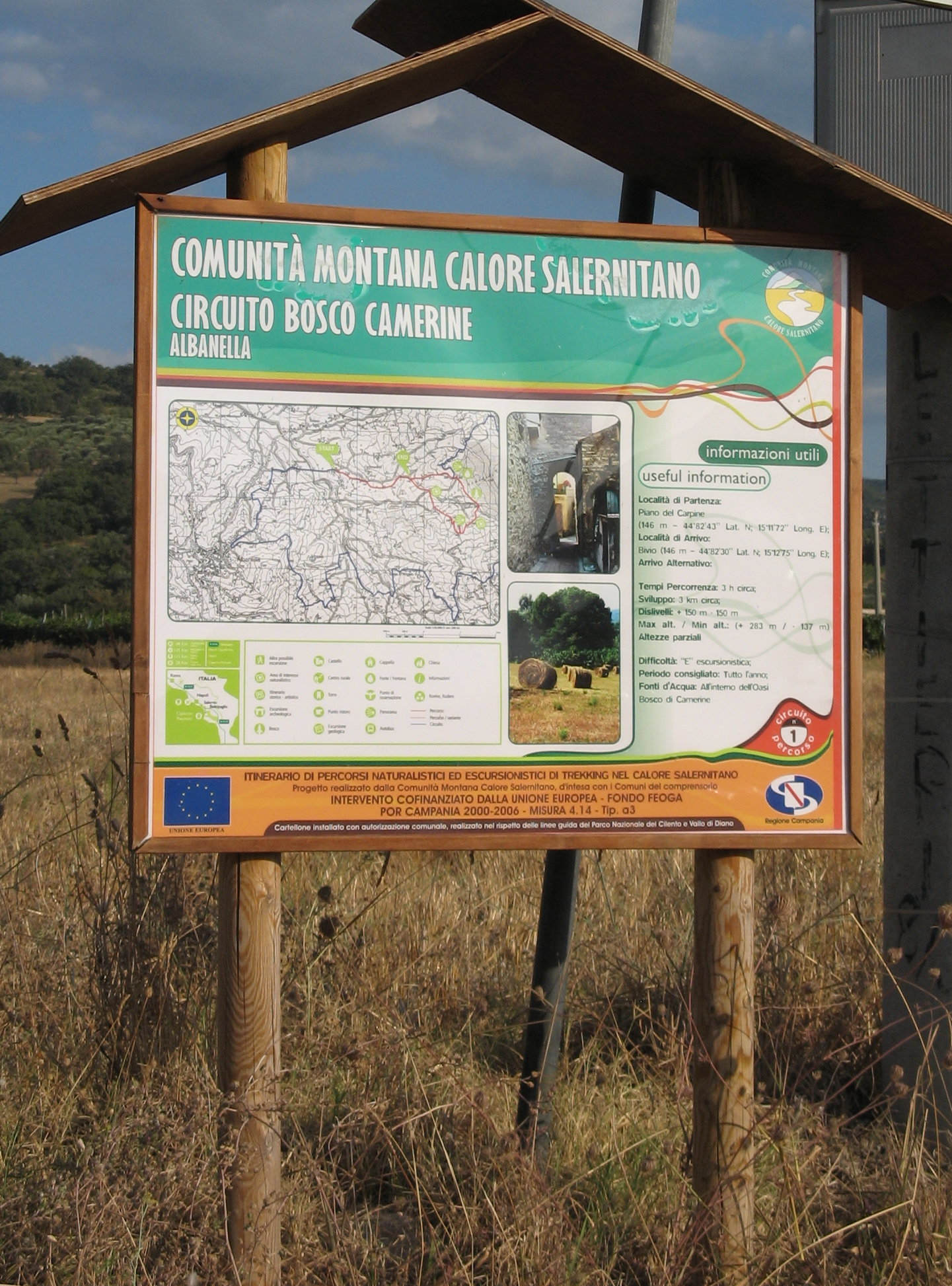 Albanella, Oasi Bosco Camerine: tabella segnaletica